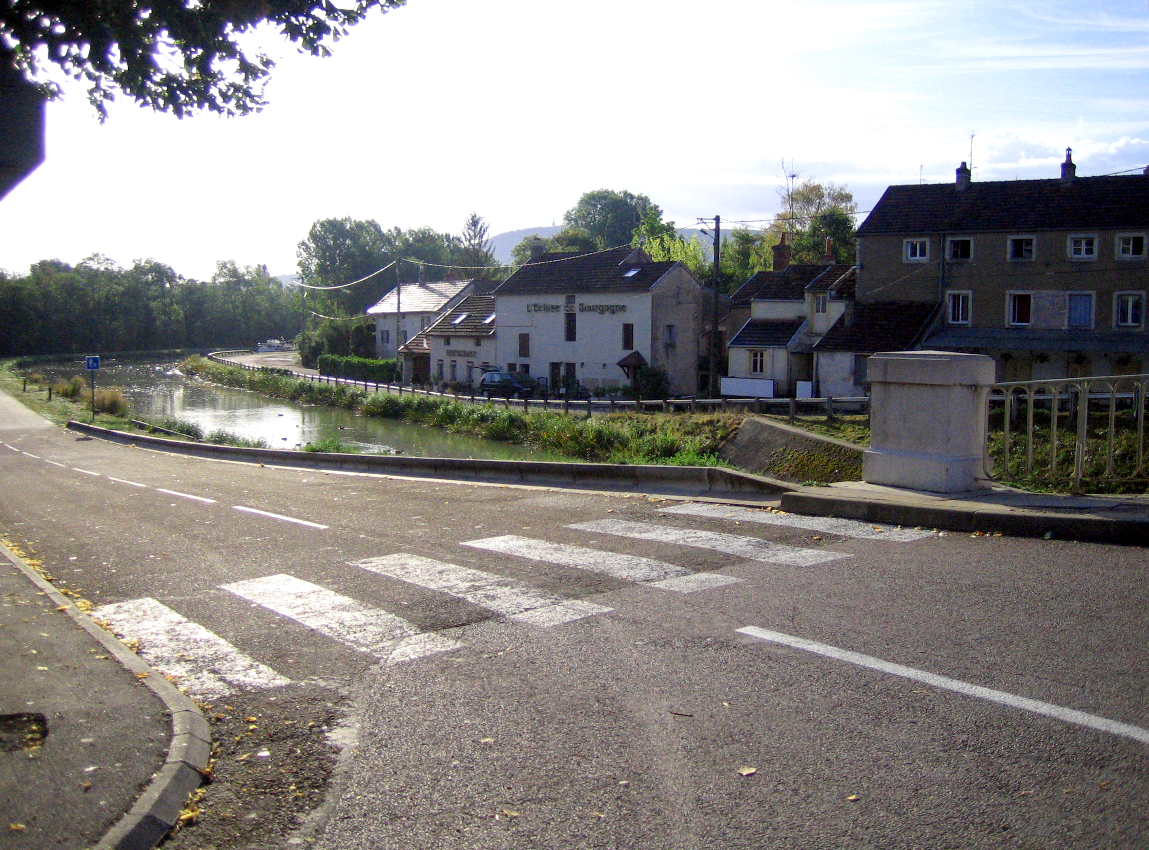 Fleurey-sur-Ouche (Côte-d'Or, France) - Le canal (vu en aval du pont, depuis le Monument aux Morts).